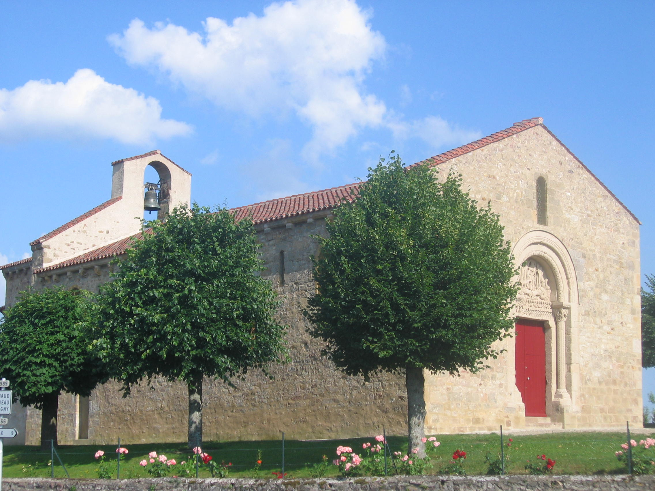 Vue générale de l'Eglise Sainte-Marie-Madeleine de Neuilly en Donjon (Allier) avec son tympan sur sa face occidentale